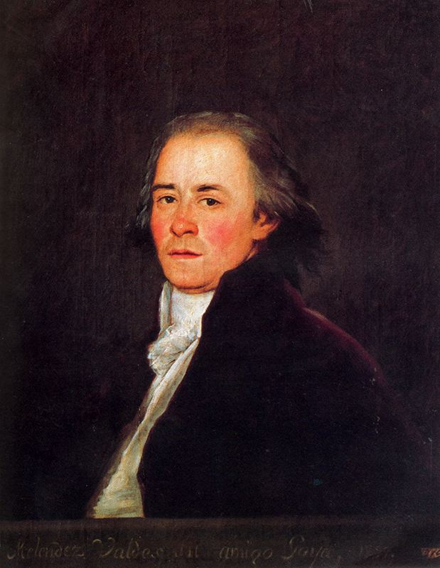 Portrait of Juan Meléndez Valdés (1754-1817), Spanish writer